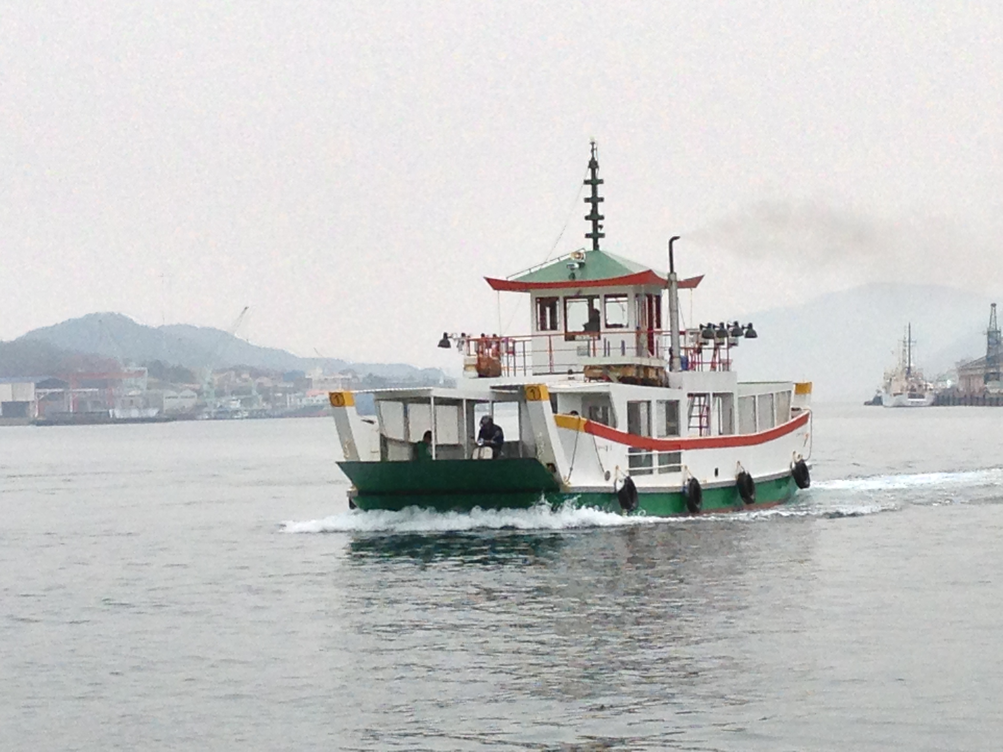 尾道水道で運航されている向島運航